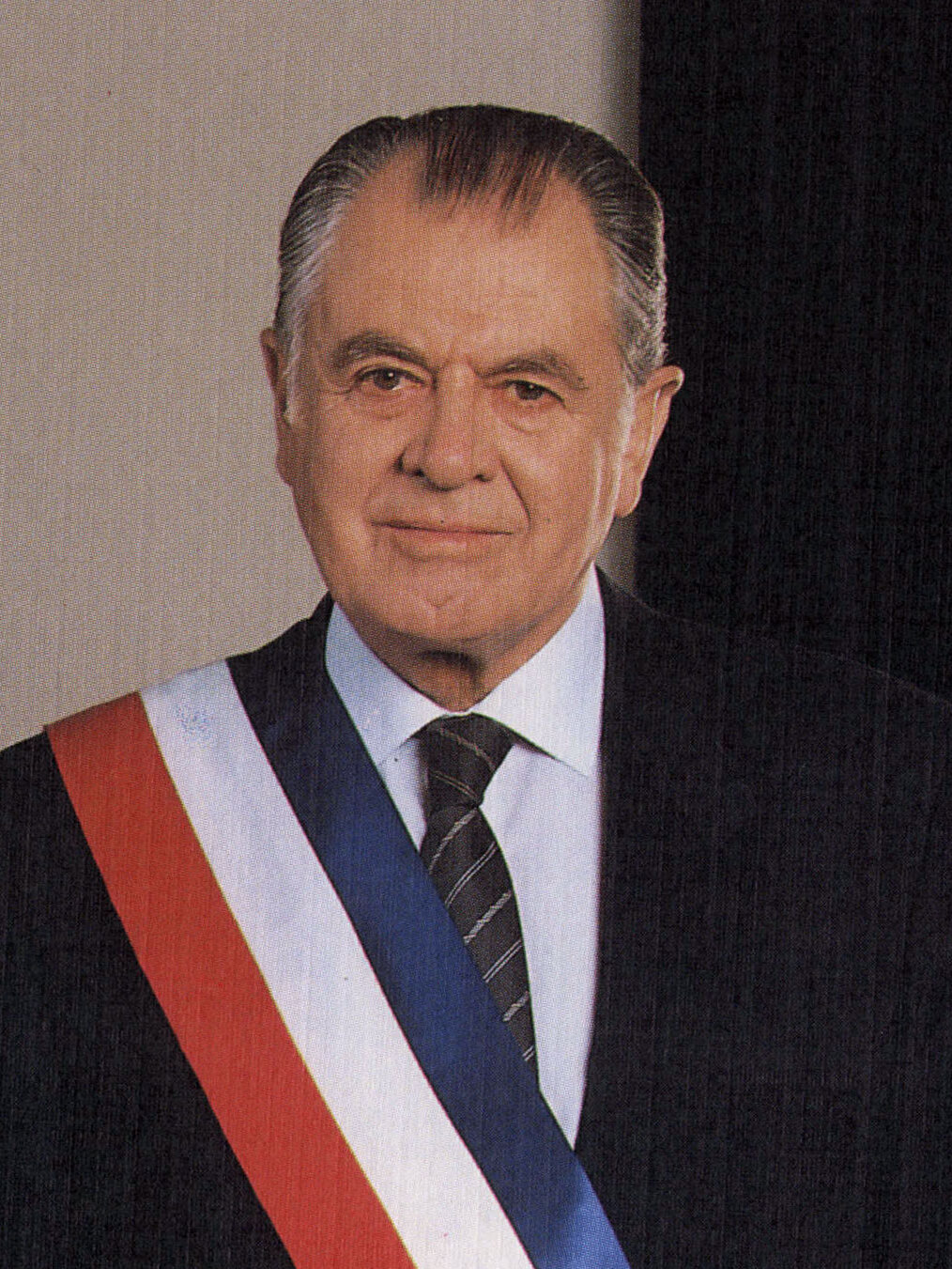 Patricio Aylwin Azócar